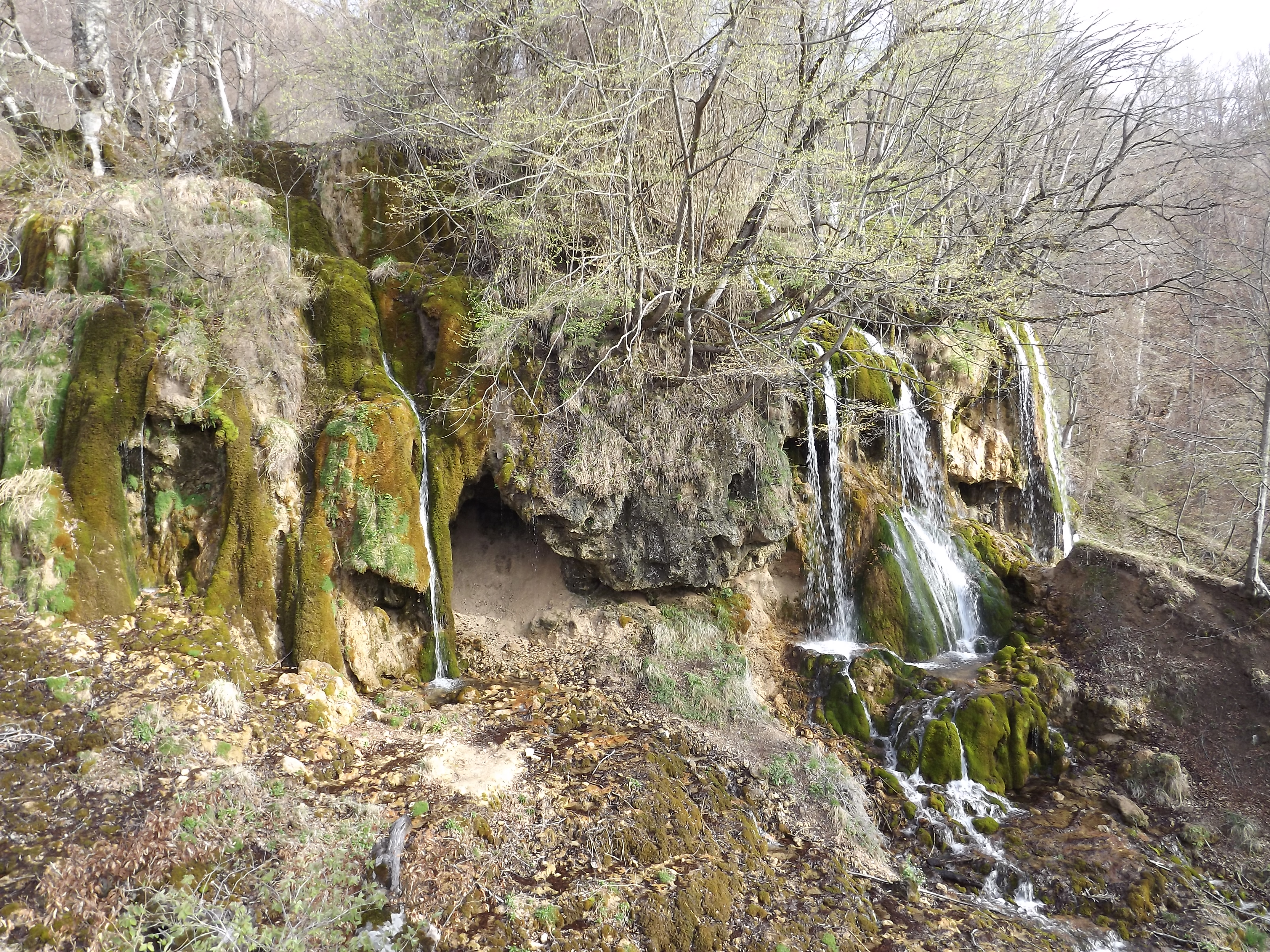 Споменик природе Слапови Сопотнице